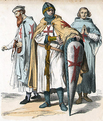 Templar